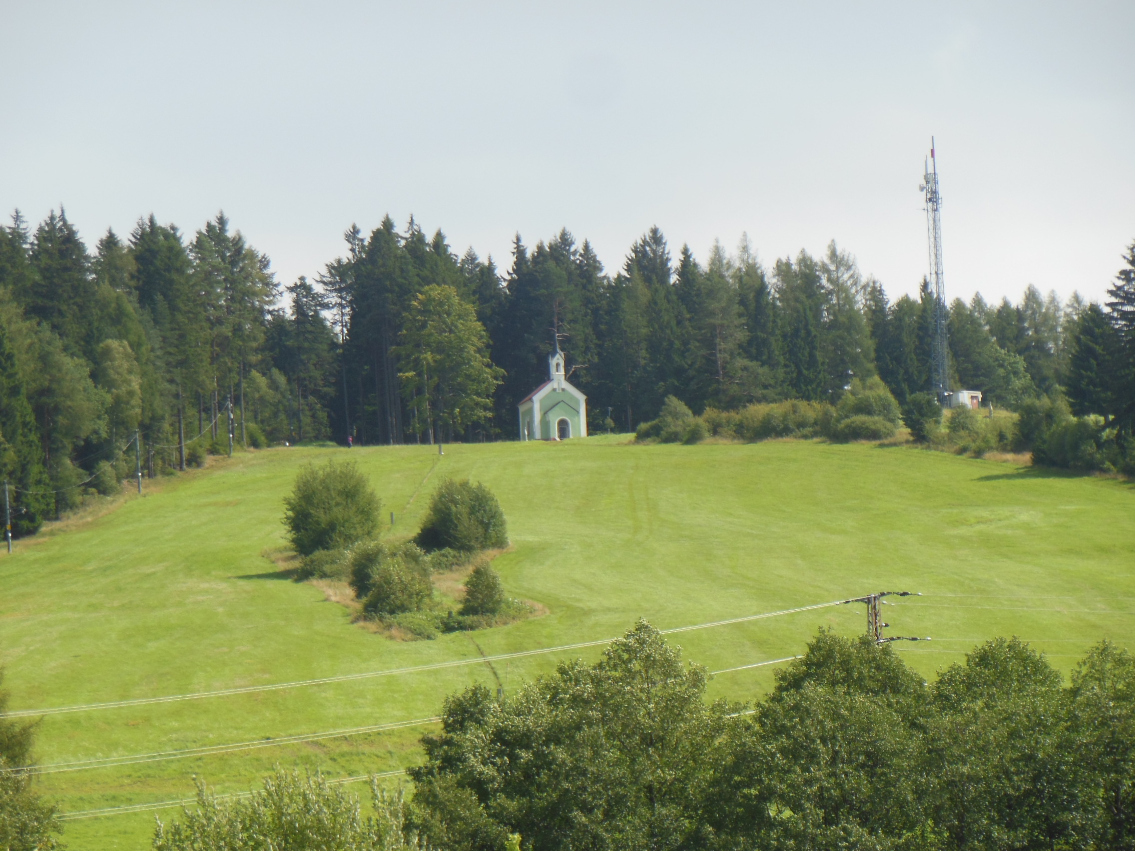 Frymburk (okres Český Krumlov). Kaple křížové cesty, pohled od silnice II/163.